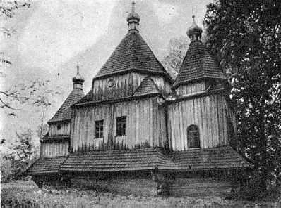 Церква Іонна Богослова у Скориках, Підволочиський район, Тернопільська область